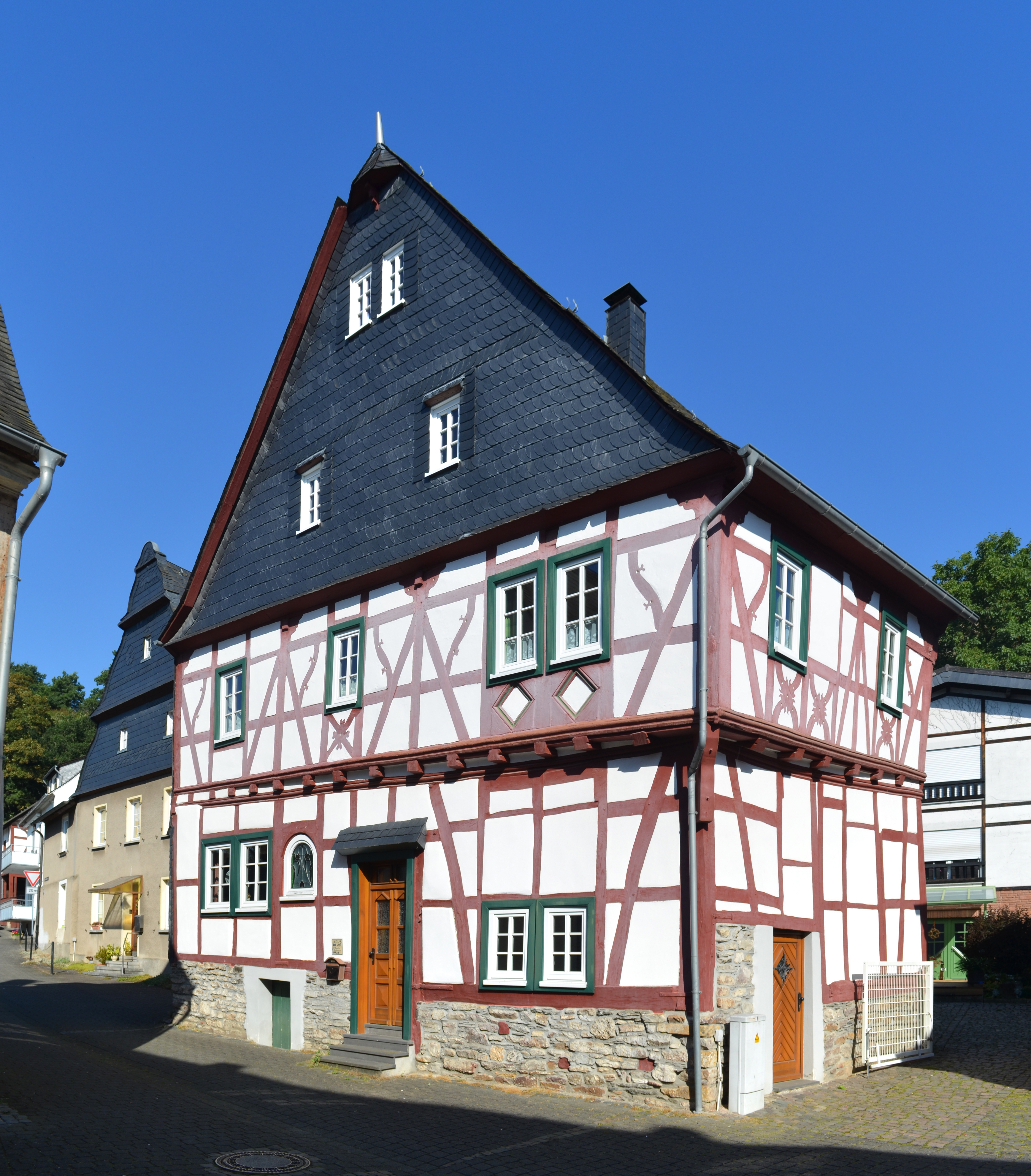 Gemünden (Hunsrück), Kirchberger Straße 5